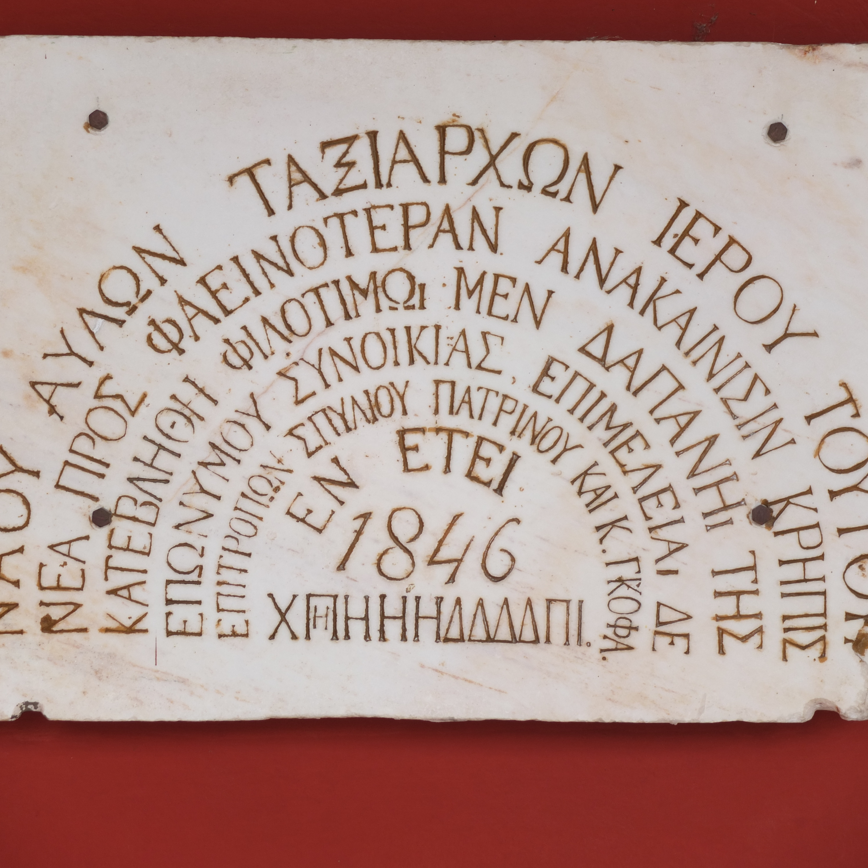 Επιγραφή που αναφέρει μεταξύ άλλων, ως δωρητή του Ιερού Ναού Ταξιαρχών Αιγίου, τον Κωνσταντίνο Γκόφα